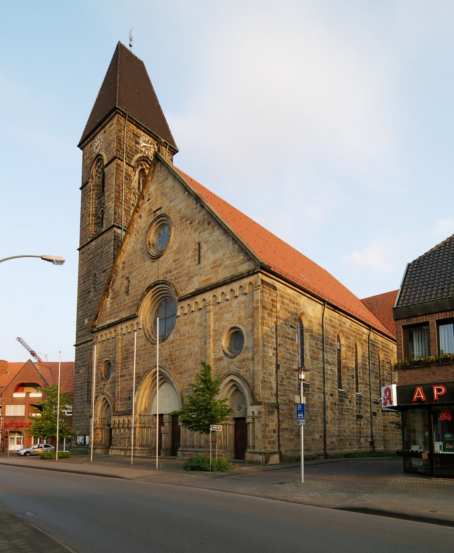 St. Stephanus in Hamm Bockum-Hövel